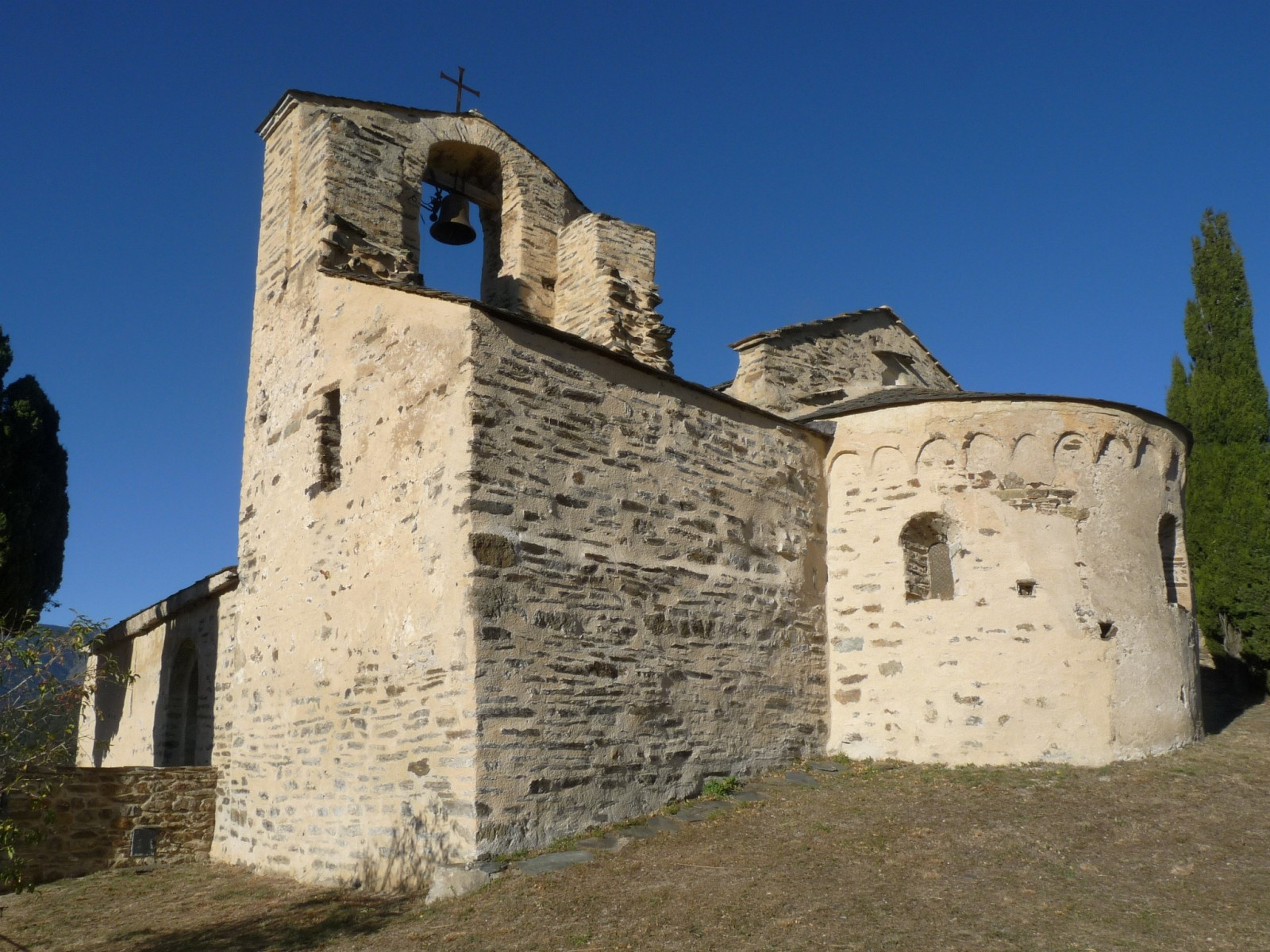 Eglise de Jujols, Pyrénées-Orientales, France